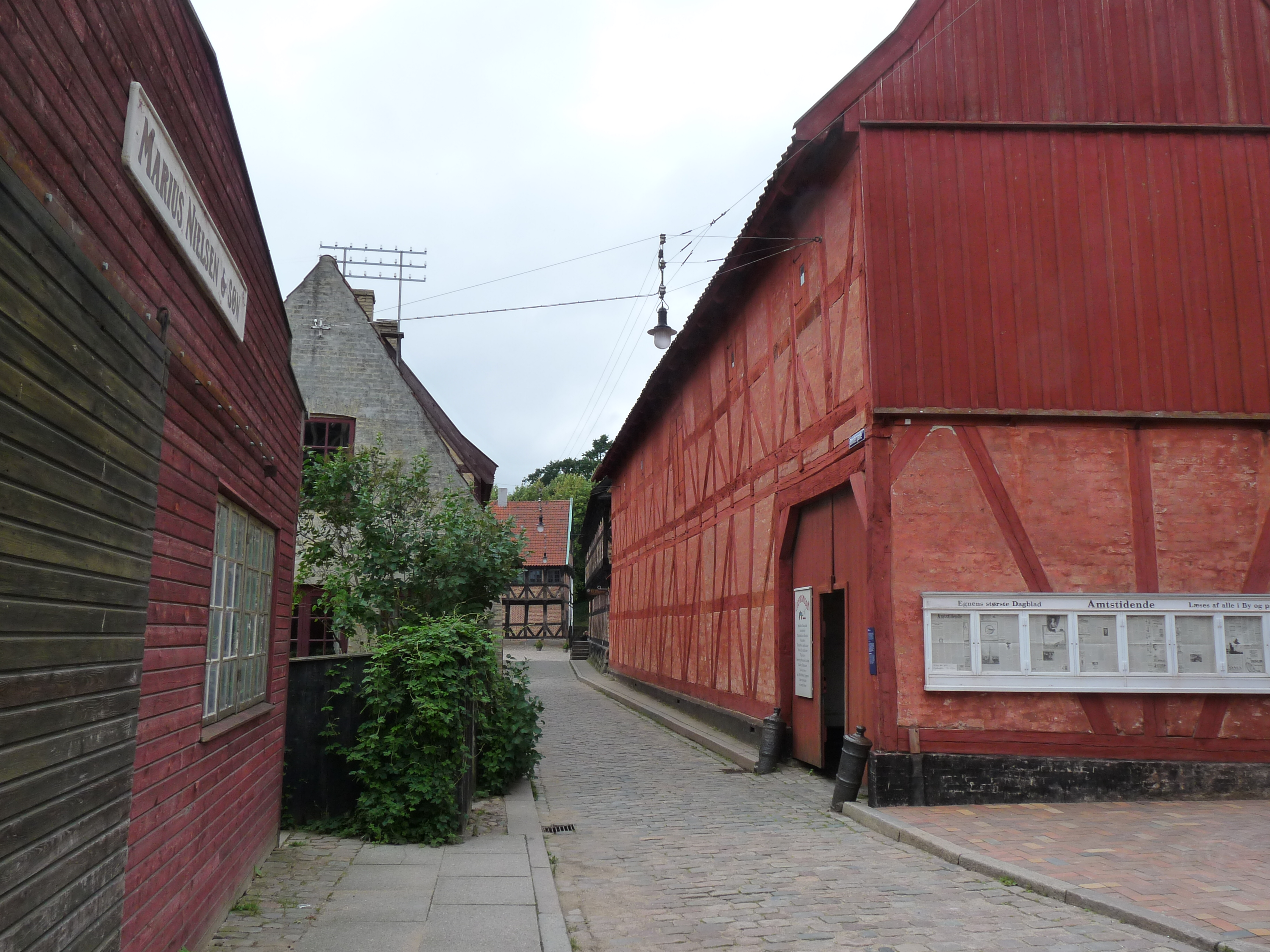 Een nagebouwde wijk van Aarhus waarbij diverse typische oude gebouwen zijn herbouwd